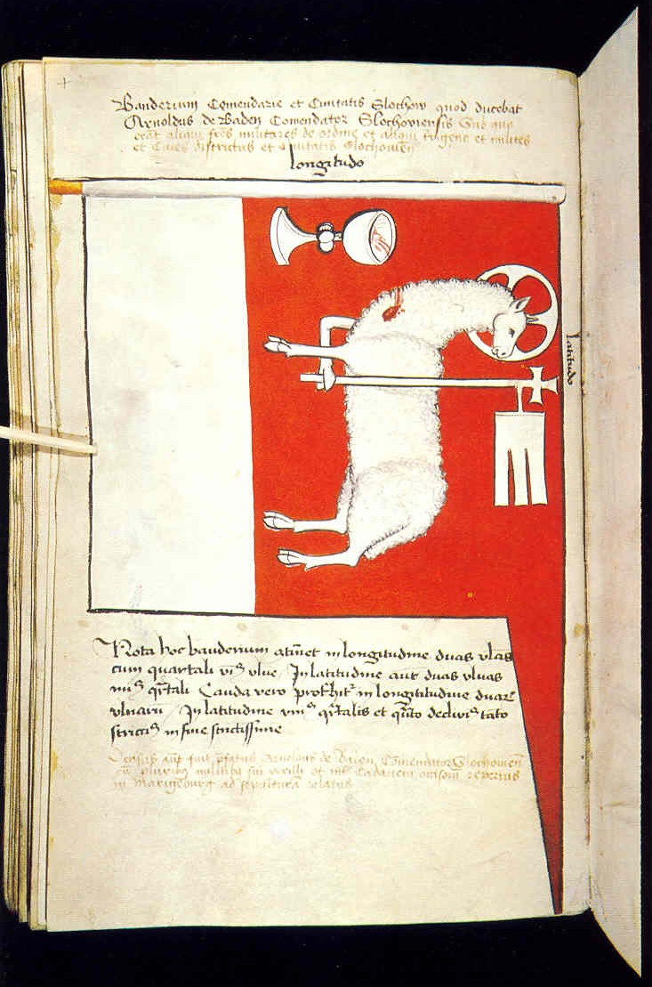 Banderium comendarie et civitatis Slochow, quod ducebat Arnoldus de Baden, contendator Slochoviensis; sub quo erant aliqui fratres militares de ordine et aliqui terrigene et milites et cives districtus et civitatis Slochouiensis.